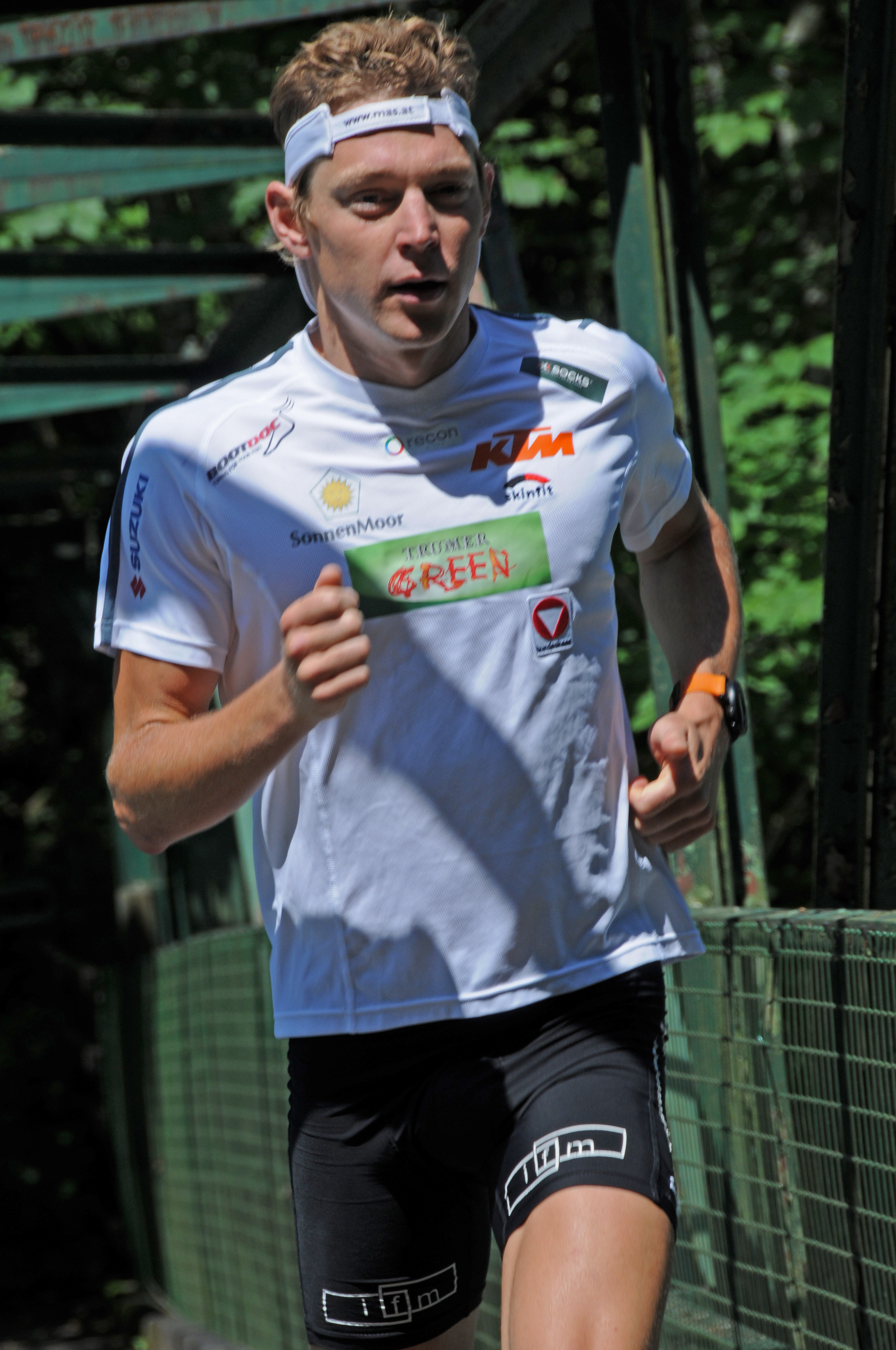 Franz Höfer beim Training